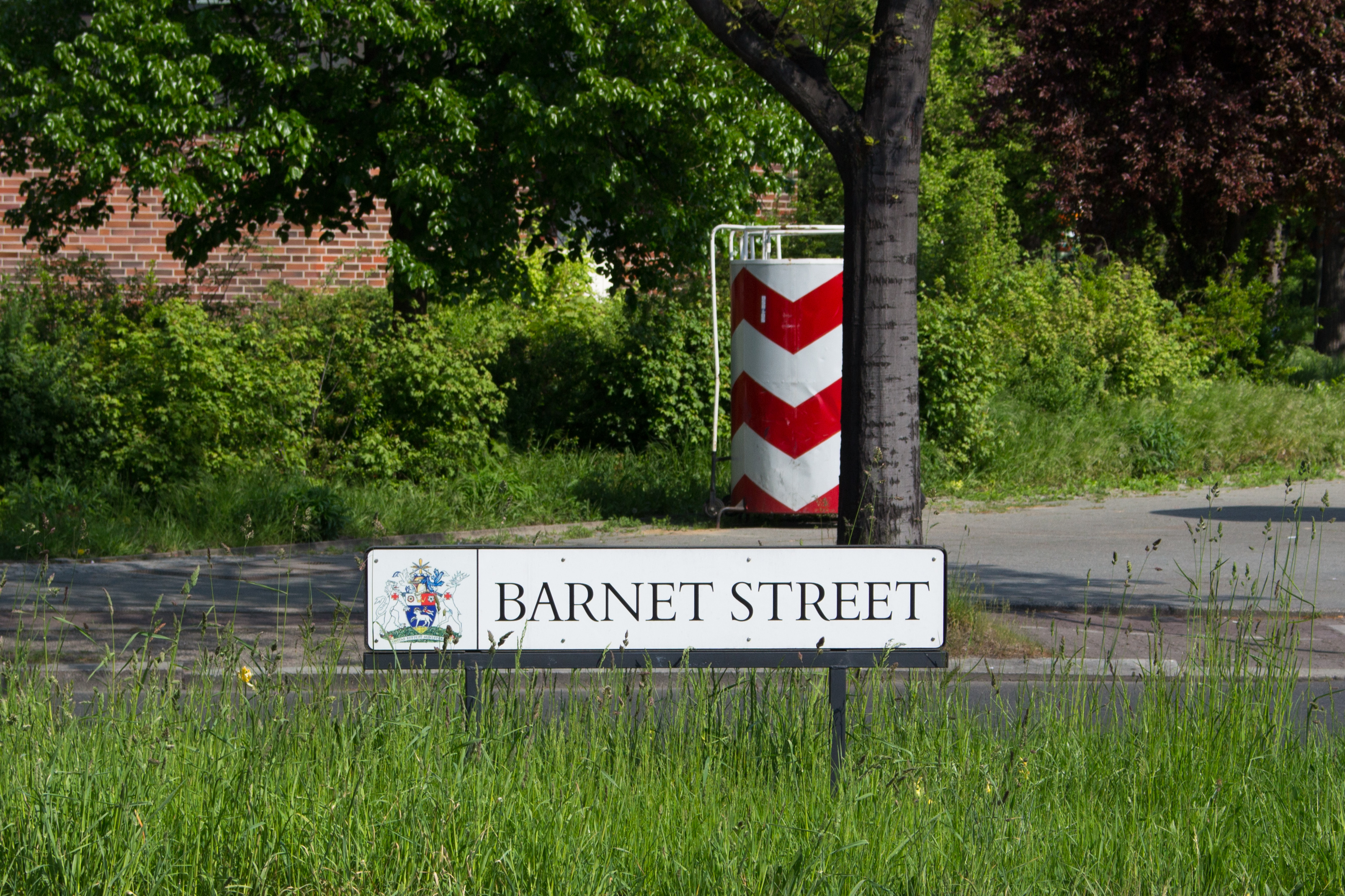 Barnetstraße in Berlin-Lichtenrade